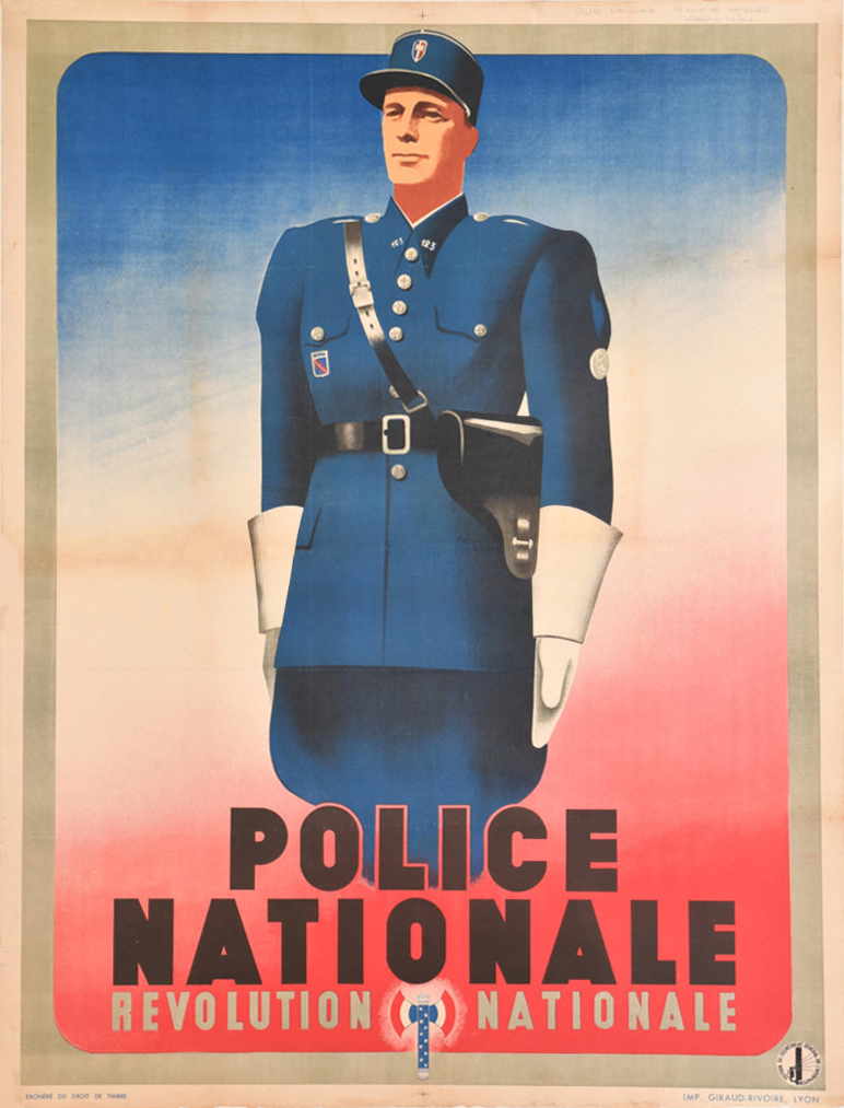 « Police nationale Révolution nationale » : affiche de propagande pour le recrutement de la Police nationale dans le cadre de la Révolution nationale du régime de Vichy, Édition du Secrétariat Général de l’Information, imprimerie Giraud-Rivoire à Lyon, fin 1941 - début 1942 (80 x 105cm).